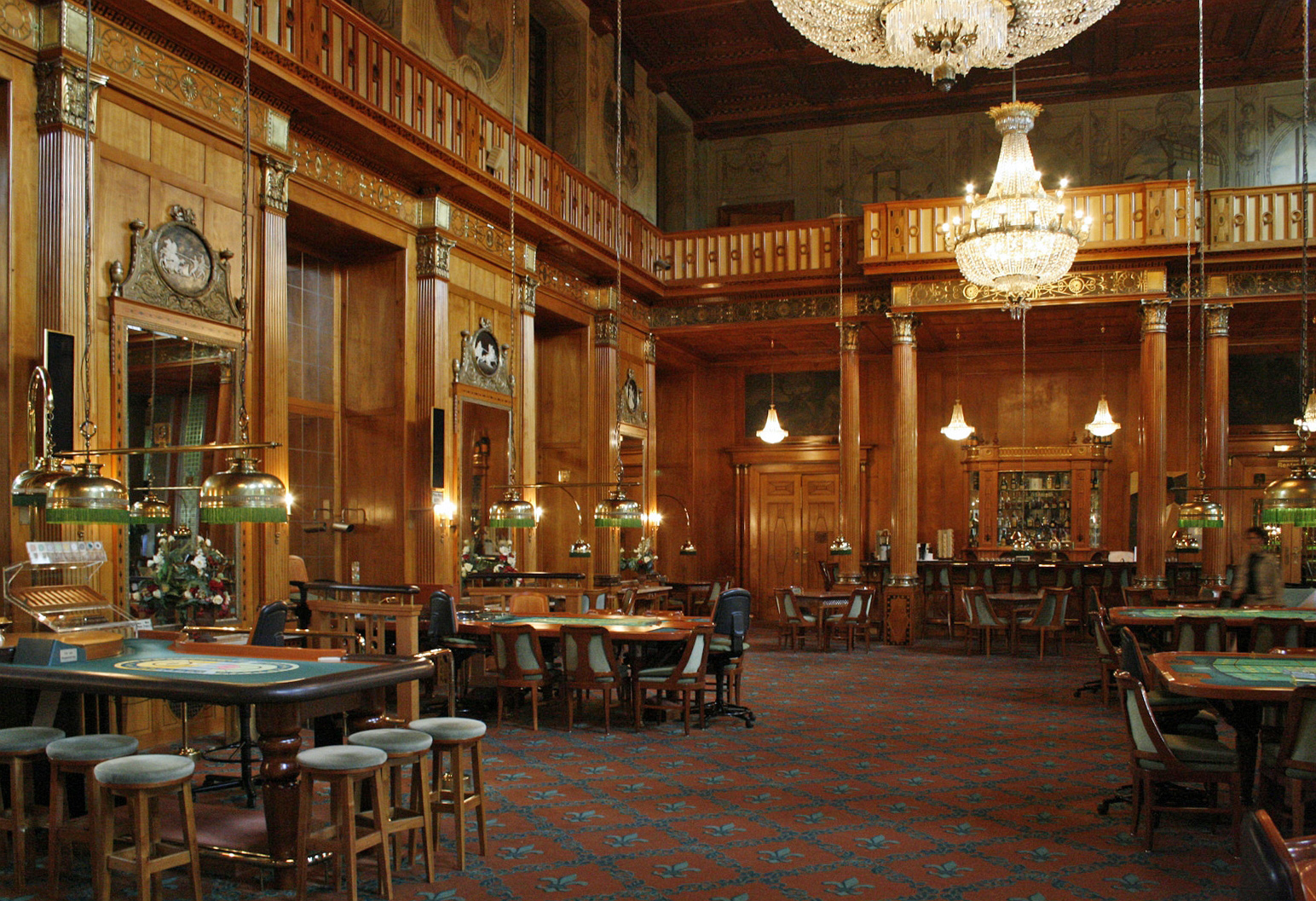 Spielbank Wiesbaden, Saal restaur. nach Friedrich von Thiersch, Entwurf 1902